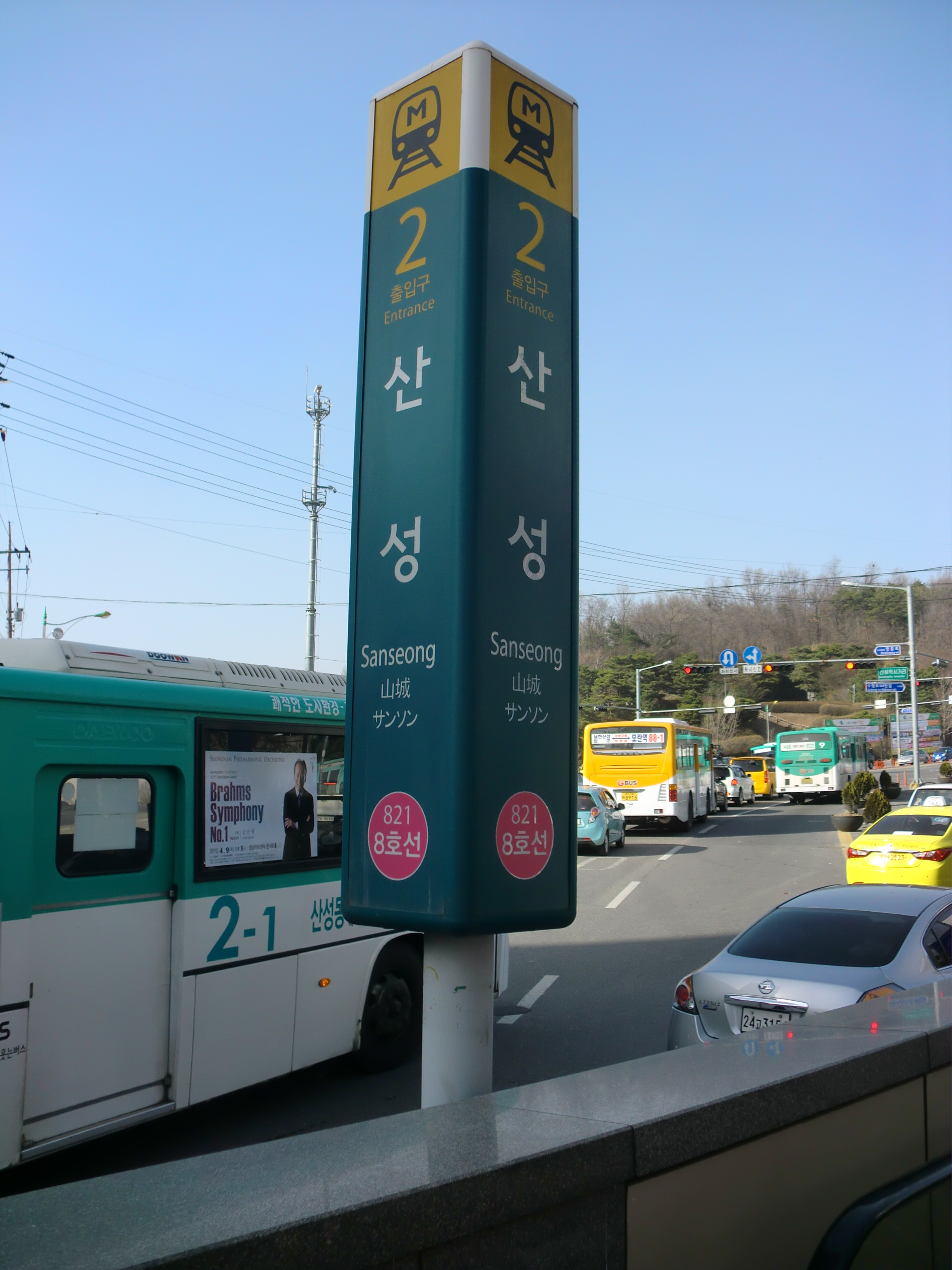 서울특별시도시철도 8호선 산성역 2번출구